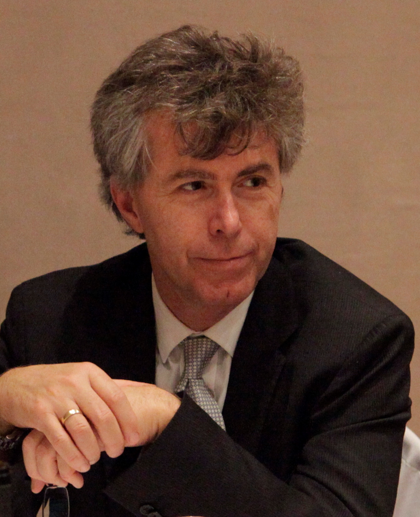 Primo piano di Paolo Colombo